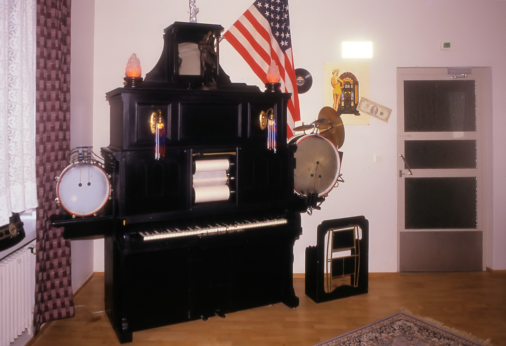 Mekaanisen musiikin museo Varkaudessa vuonna 1989